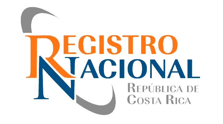 Logo del Registro Nacional de Costa Rica.